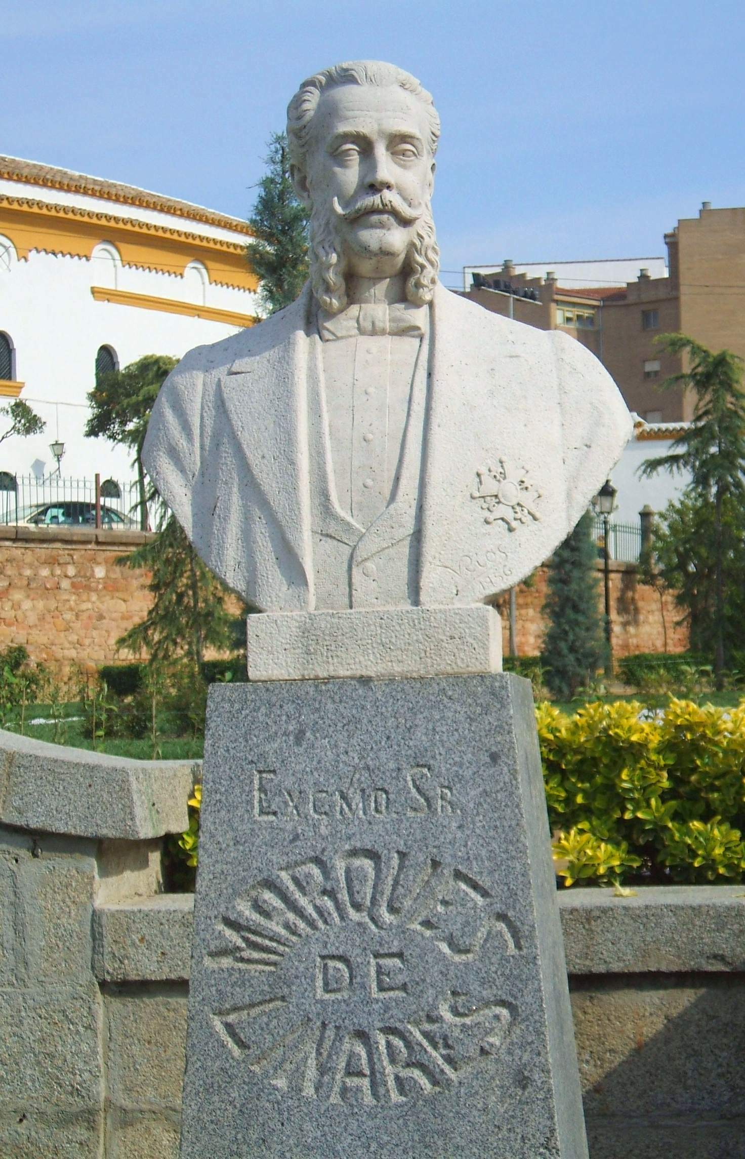 Monumento a los Marqueses de Linares (Jardines de Santa Margarita, Linares, Jaén)